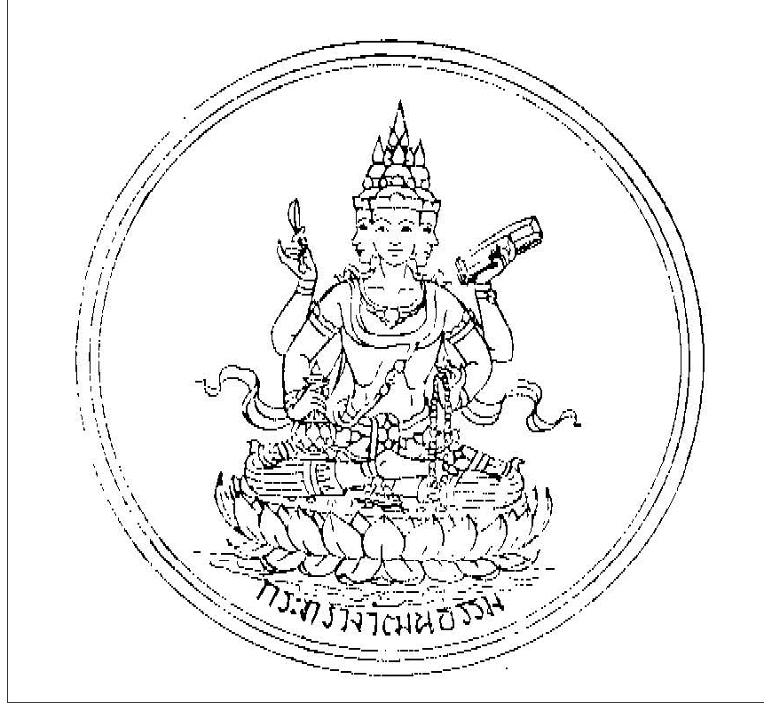 ตราแรกของกระทรวงวัฒนธรรมนั้น เป็นรูปพระพรหม 4 หน้า 4 หัตถ์ ประทับอยู่ยนดอกบัวบานโพล่จากน้ำ หัตถ์ซ้ายบนถือสมุดดำ (หมายถึงศิลปวิทยา)หัตถ์ซ้ายล่างถือประดำ (เกี่ยวกับคะแนนนับ)หัตถ์ขวาบนถือช้อนตักเนย (แสดงว่าไม่มีอาวุธอย่างไร)หัตถ์ขวาล่างถือหม้อน้ำ (เกี่ยวกับน้ำอมฤต) ภายในกรอบวงกลมเบื้องล่างมีอักษร "กระทรวงวัฒนธรรม"